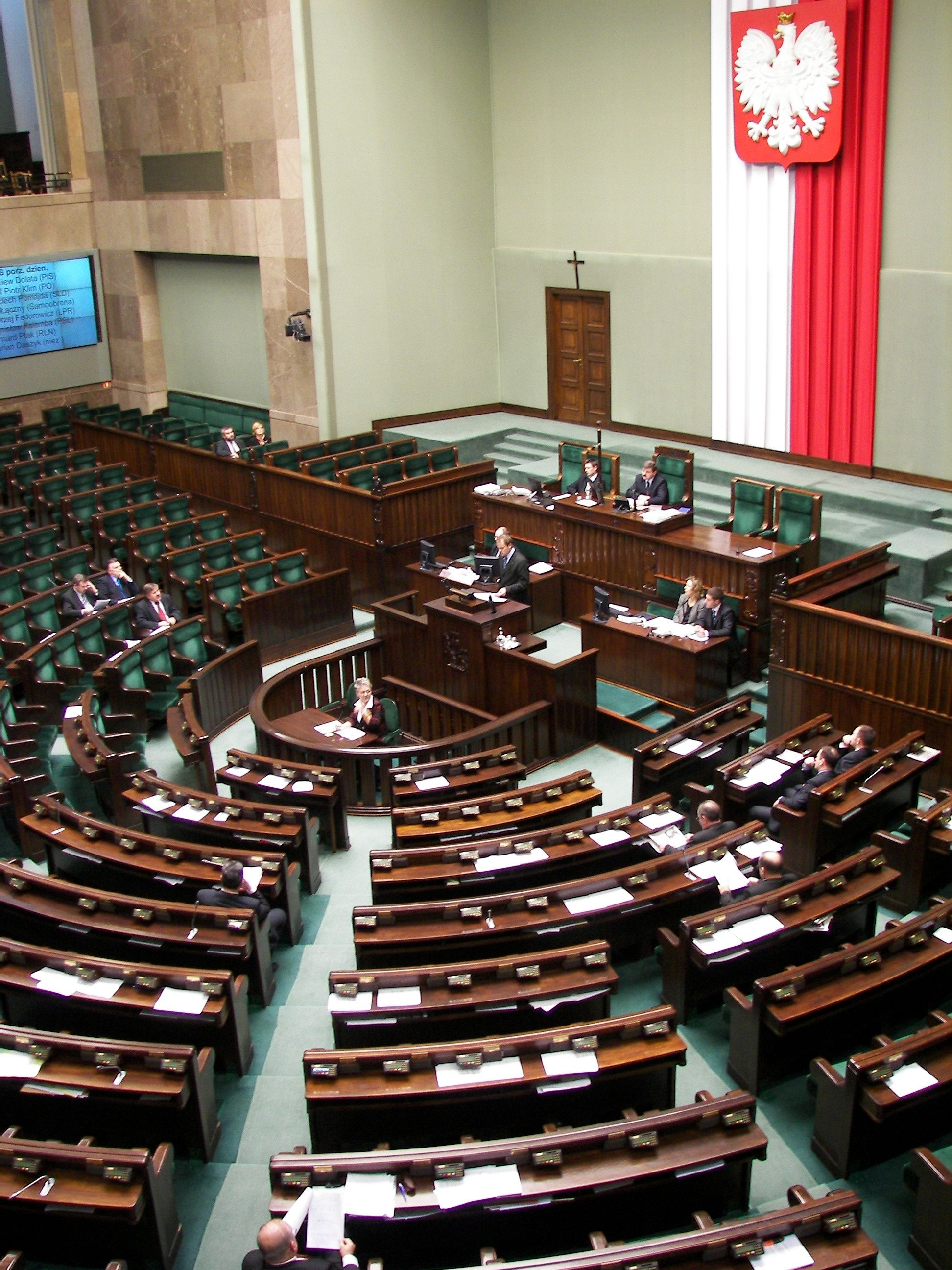 Sejm RP, Sala Plenarna (pionowe), zdjęcie wykonano 11 stycznia 2007, autor: Piotr VaGla Waglowski